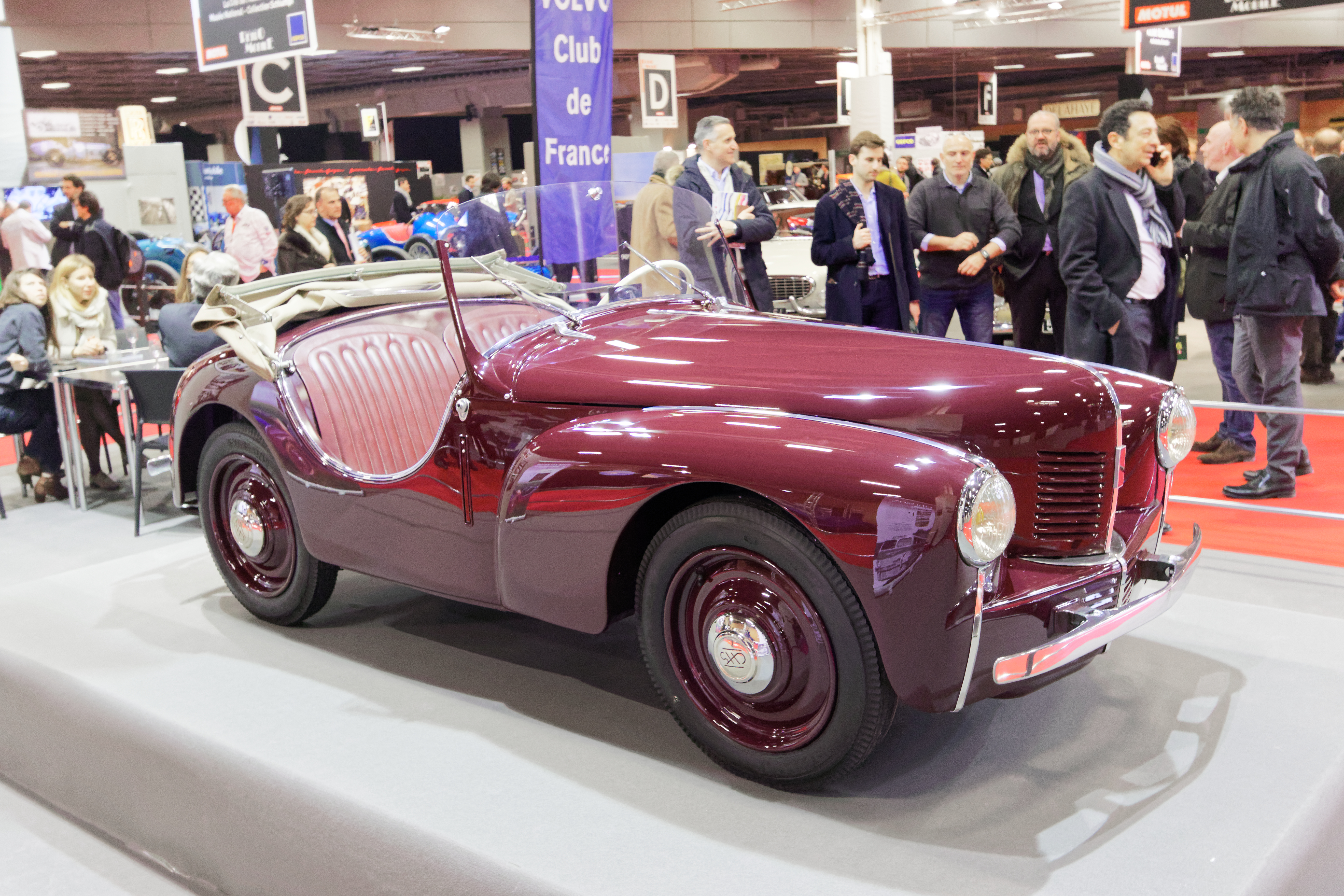 Le prototype de la Chausson CHS de 1942 exposée lors du salon Rétromobile 2017.